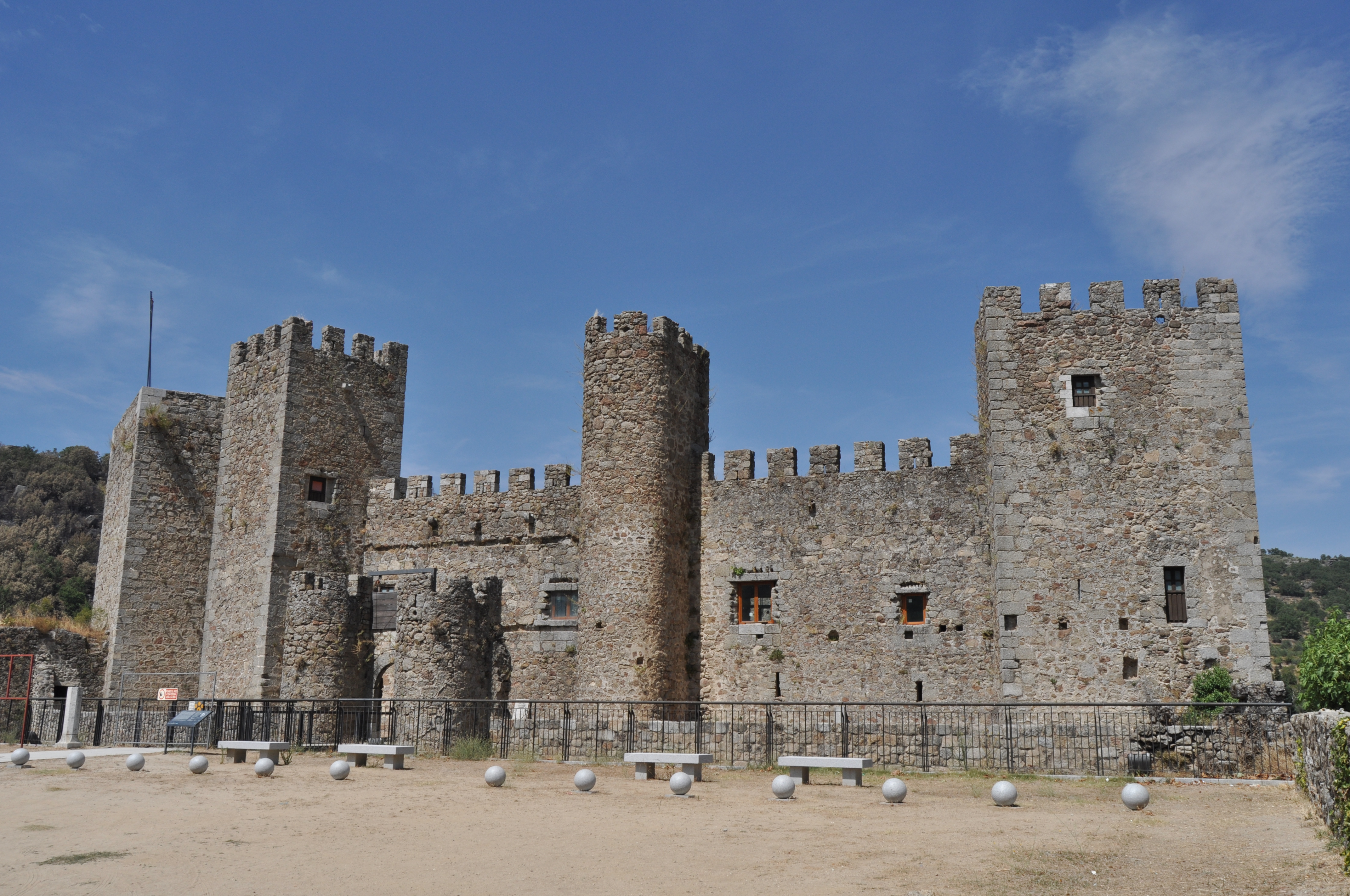 Montemayor del Rio - 029